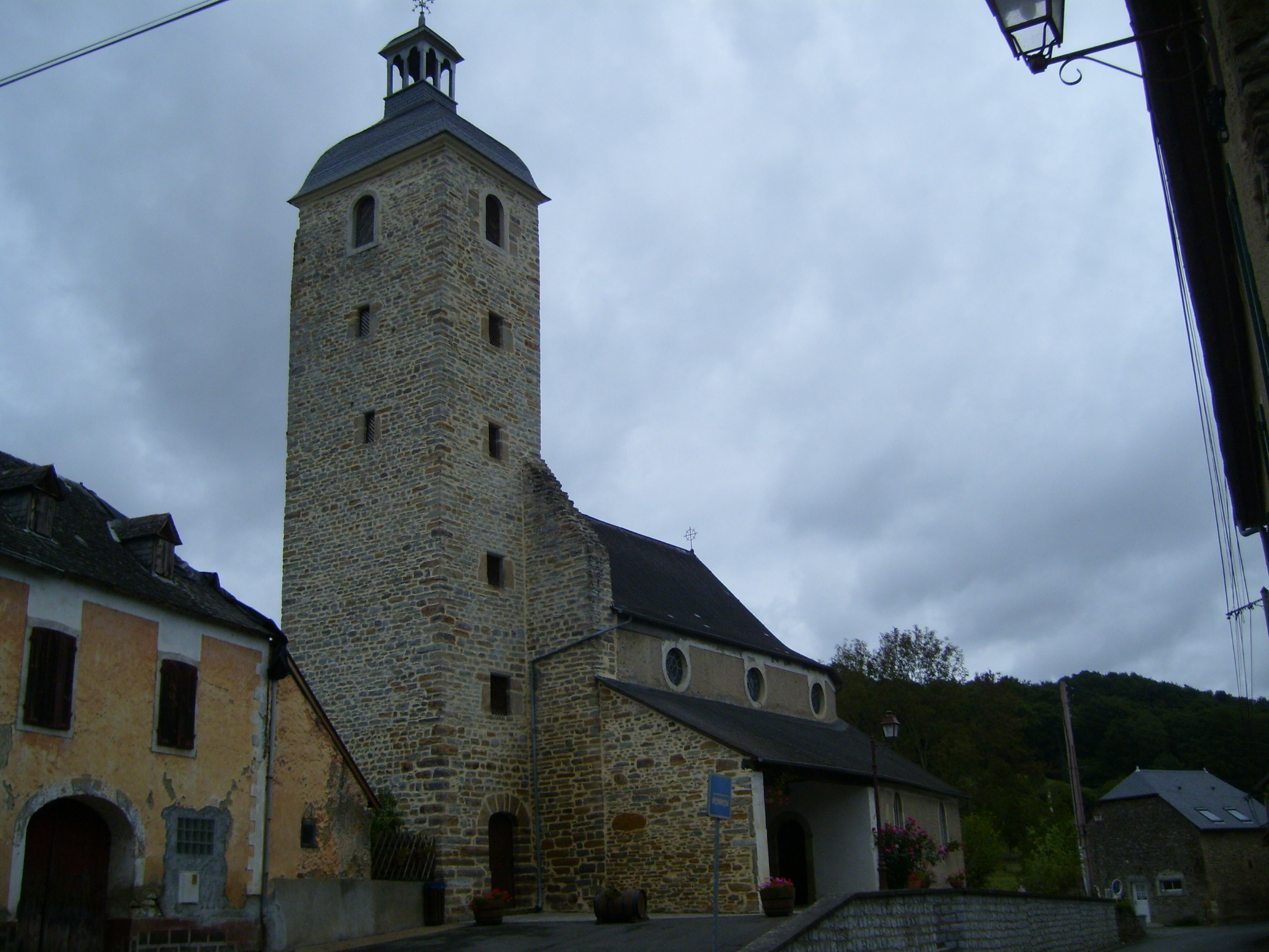 Eglise Saint-Jean Baptiste de Saucède